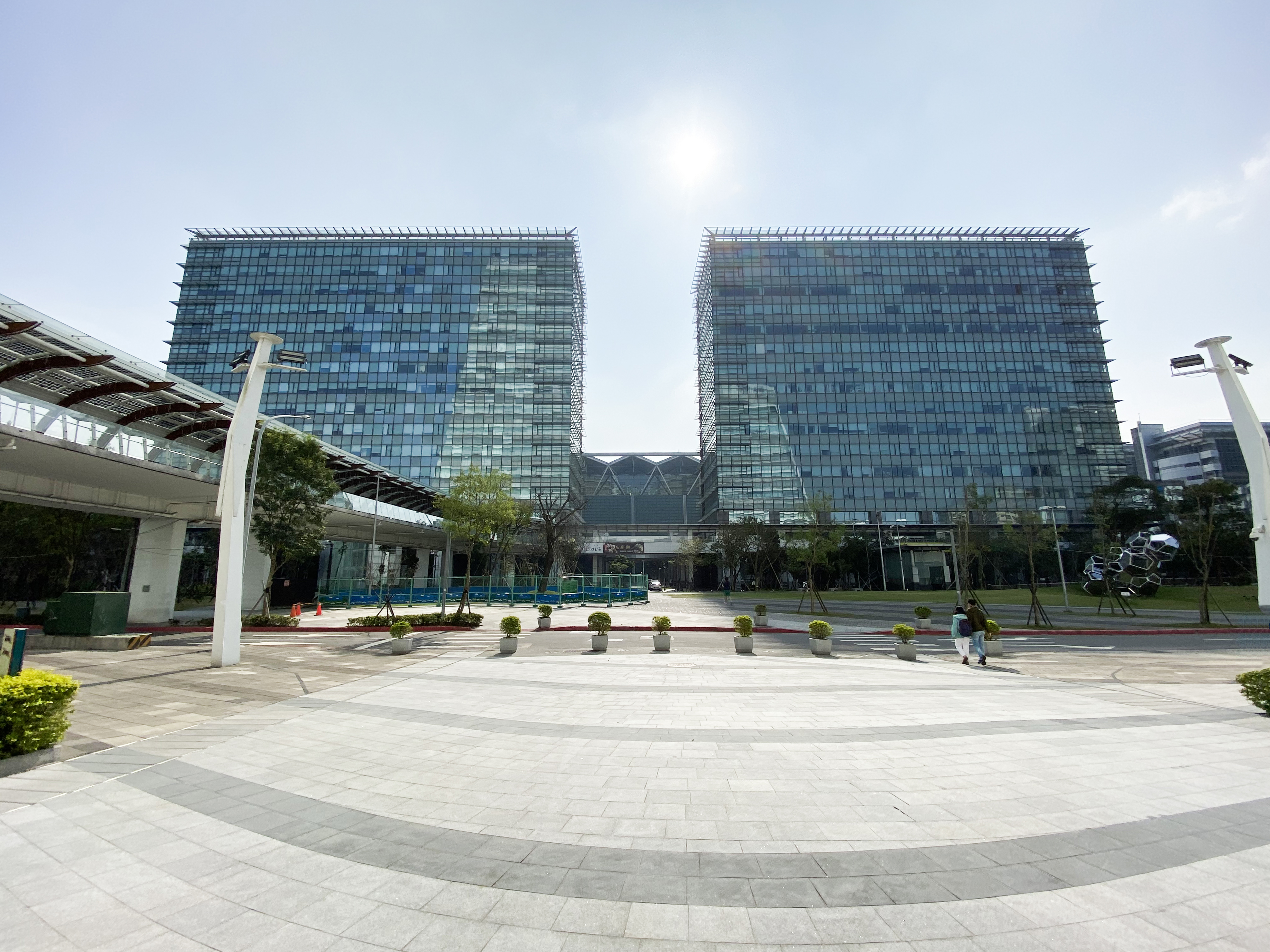 Nankang Software Park Phase 3 Void